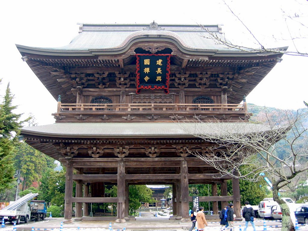 The gate of Kencho temple in Kamakura, Kanagawa, Japan